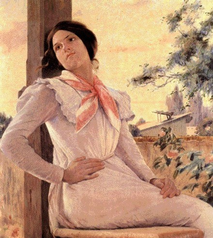 retrato de una mujer en el balcon